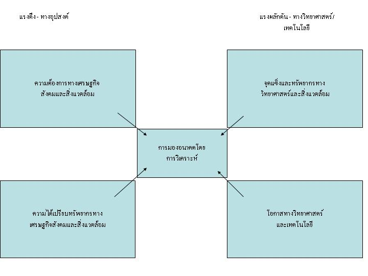 ปัจจัยที่มีอิทธิพลต่อ “การมองอนาคต”